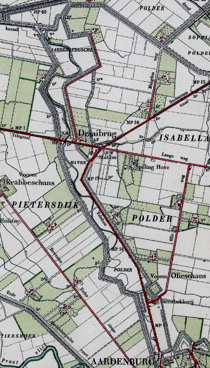 Aardenburgse_Havenpolder